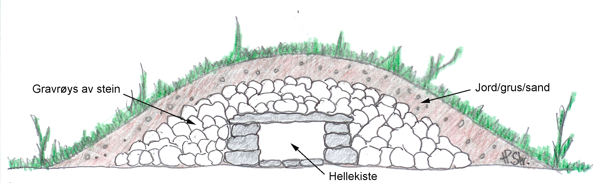 Snitt av en typisk gravhaug (2005). Skisse: Hallvard Straume